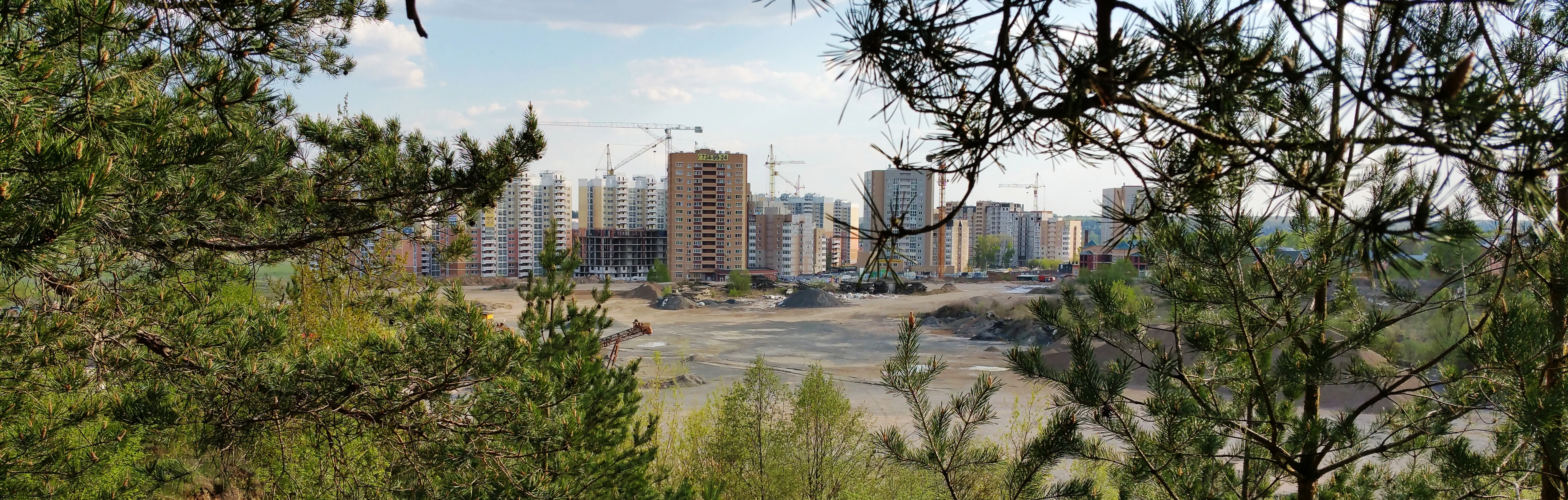 Вид на Восточный с Мозжинского оврага